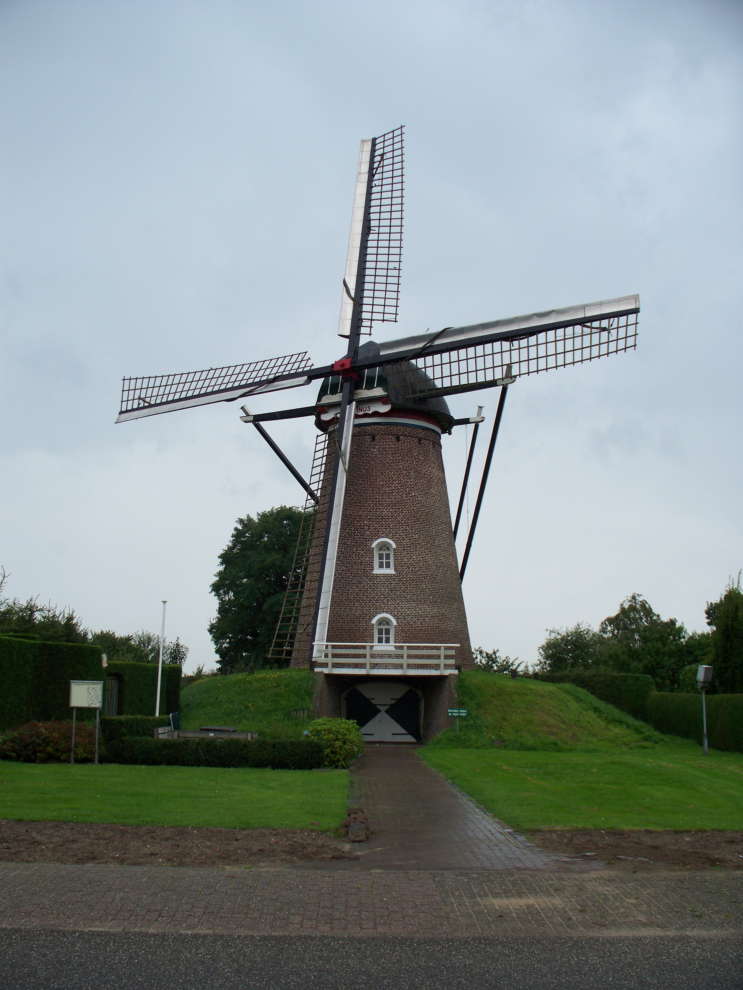 Windmolen Martinus te Beugen, Molenstraat